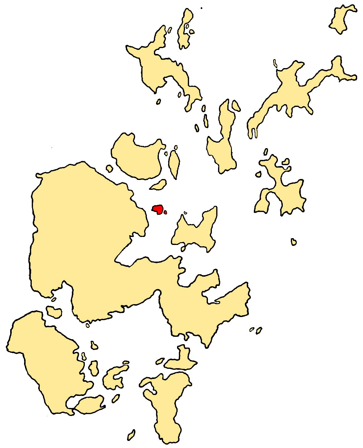 Gairsay